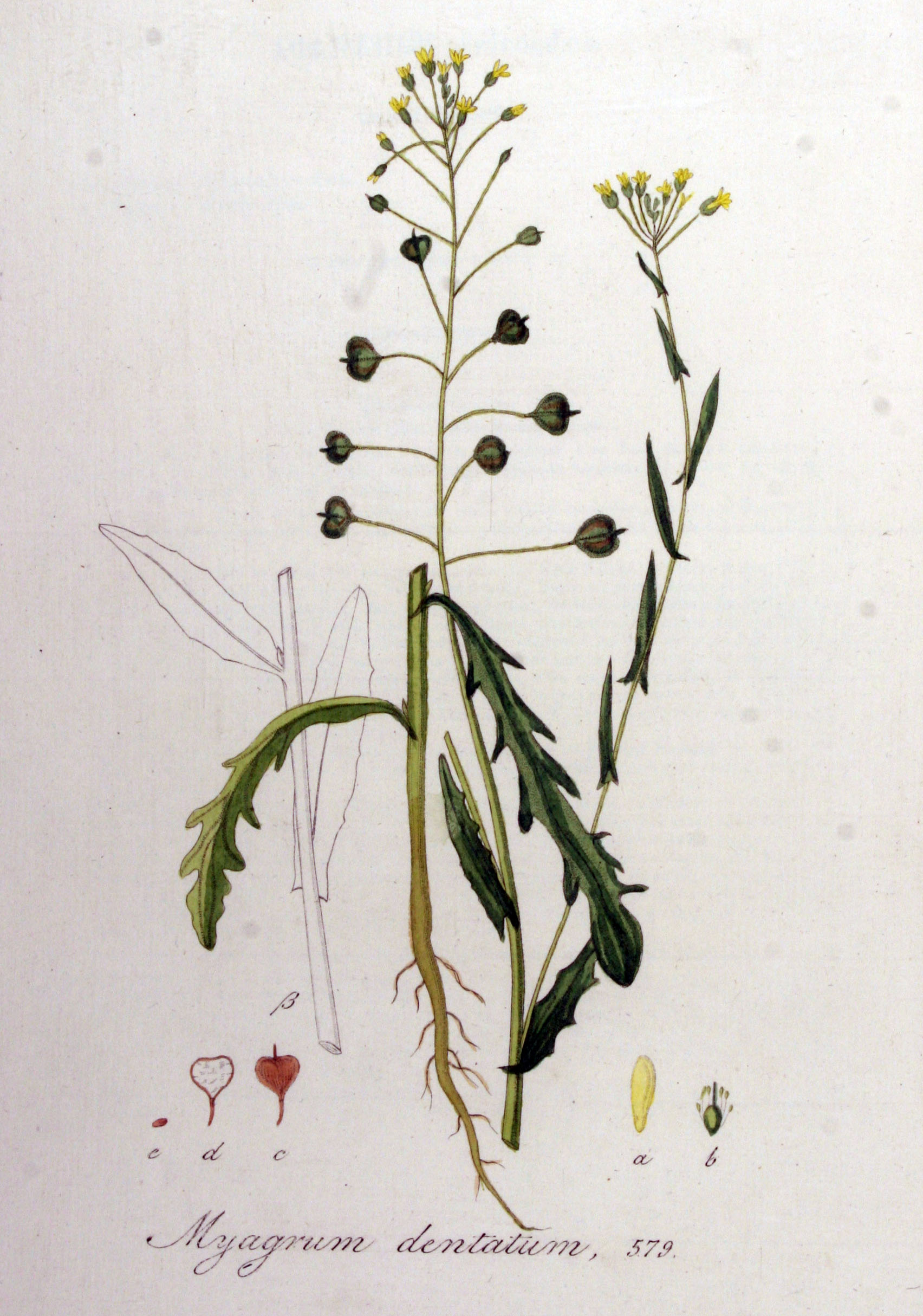 Camelina alyssum (Mill.) Thell. (Syn. Myagrum dentatum Willd.)